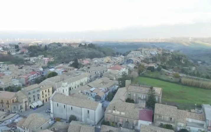 Girifalco: piazza Vittorio Emanuele II e zone limitrofe, corso Roma e Pioppi Vecchi visti dall'alto.